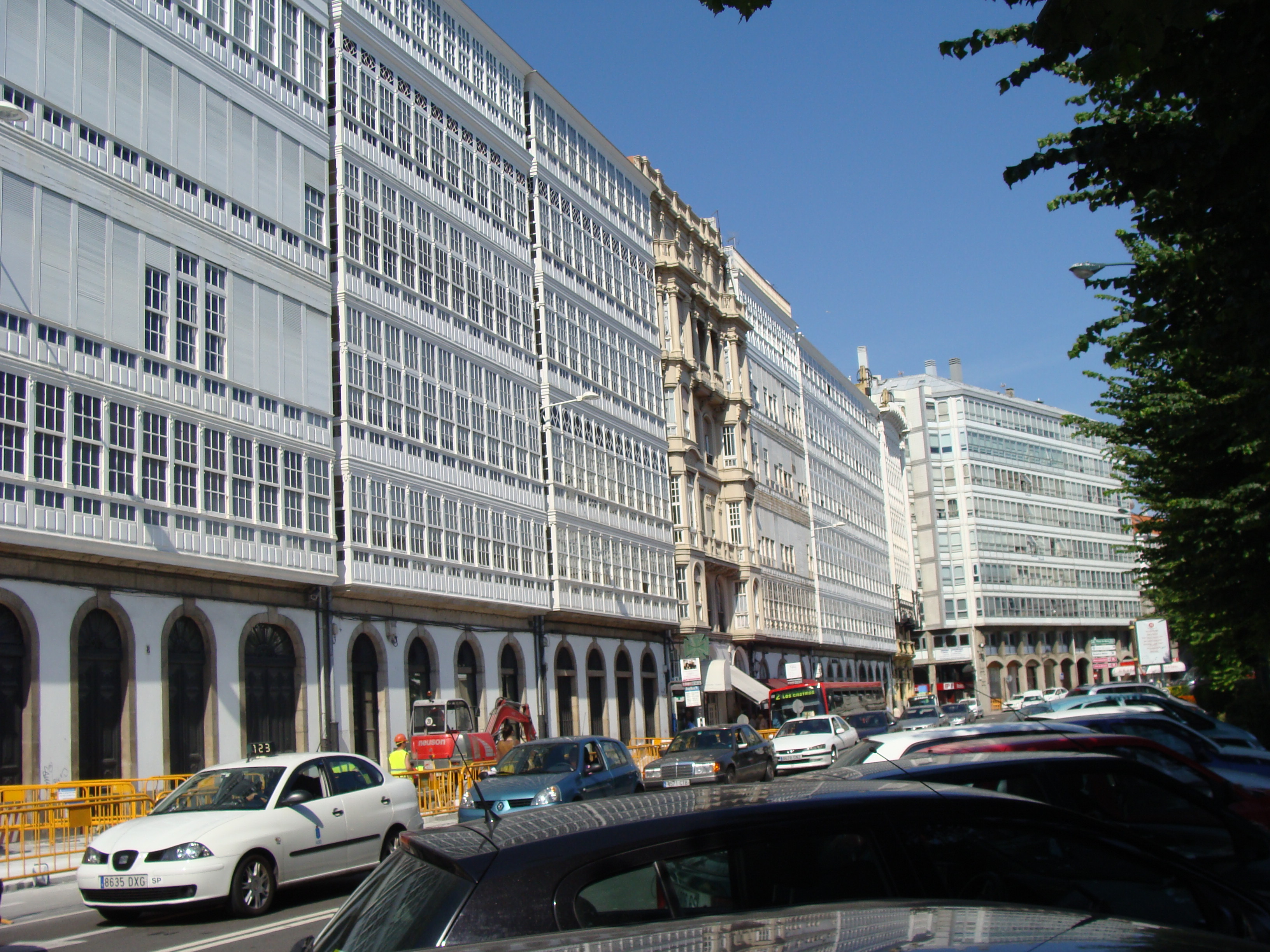 Las típicas galerías acristaladas de La Coruña realizan funciones de calefacción natural en invierno